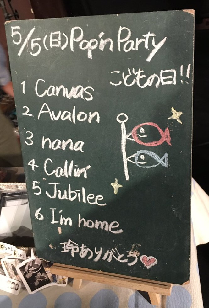 amiinAセトリボード